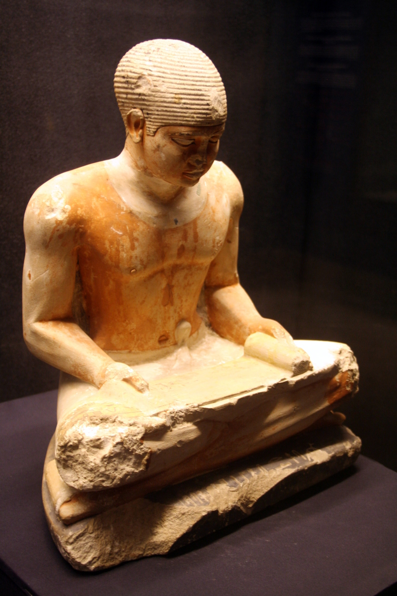 Statue en calcaire de Ptahchepsès (Ve dynastie), musée Imhotep à Saqqarah